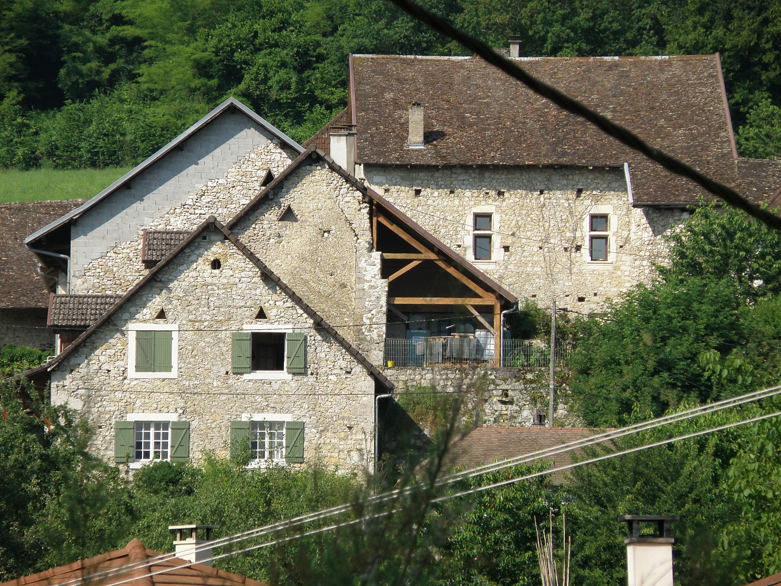 Massignieu-de-Rives, comm. du département de l’Ain (région Rhônes-Alpes, France). Hameau du Grand Écrivieu (ou anciennement Grand Escrivieu), sis au nord-ouest du bourg-centre. En haut à droite, ancienne maison-forte.